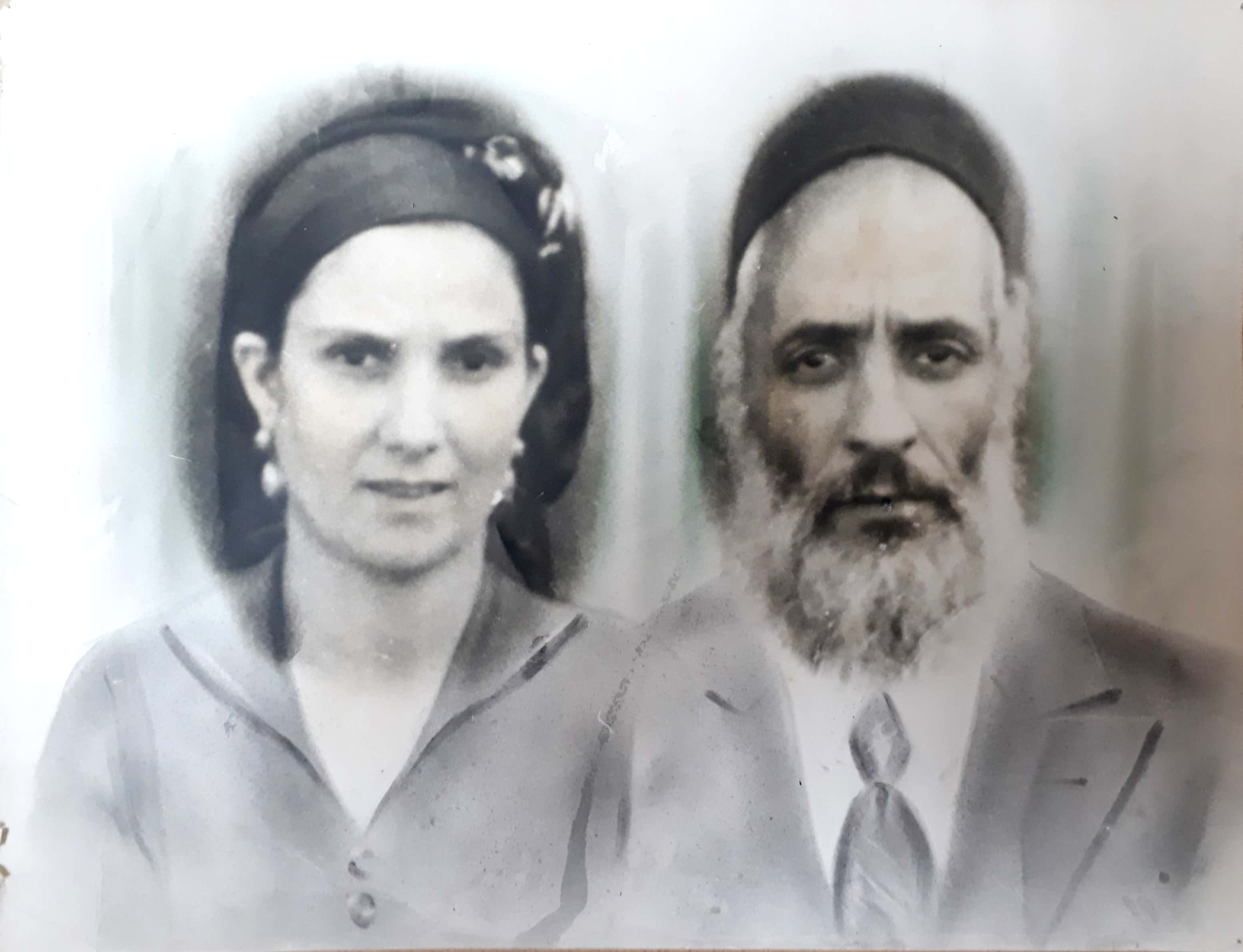 דוד ועישה הרוש, זוג יהודי שעלה מקהילת תאפיללת